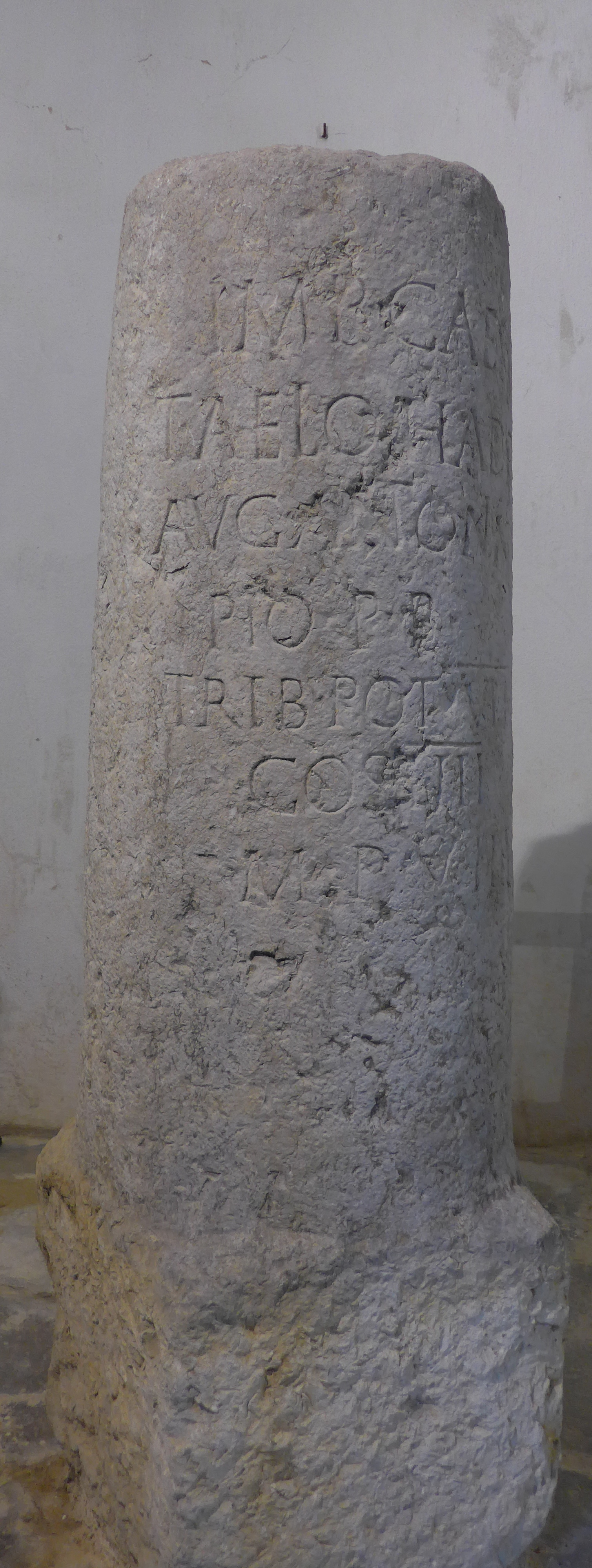 Rochemaure (Ardèche, France), une des plus belles bornes milliaires de l'Ardèche, provenant de la Croix de la Lauze, sur la voie d'Antonin le Pieux, a retrouvé sa commune d'origine après avoir été conservée dans le jardin de la préfecture puis le lycée de Privas. Abritée dans la chapelle Notre-Dame-des-Anges, sa copie trône devant la mairie; celle-ci est l'originale.